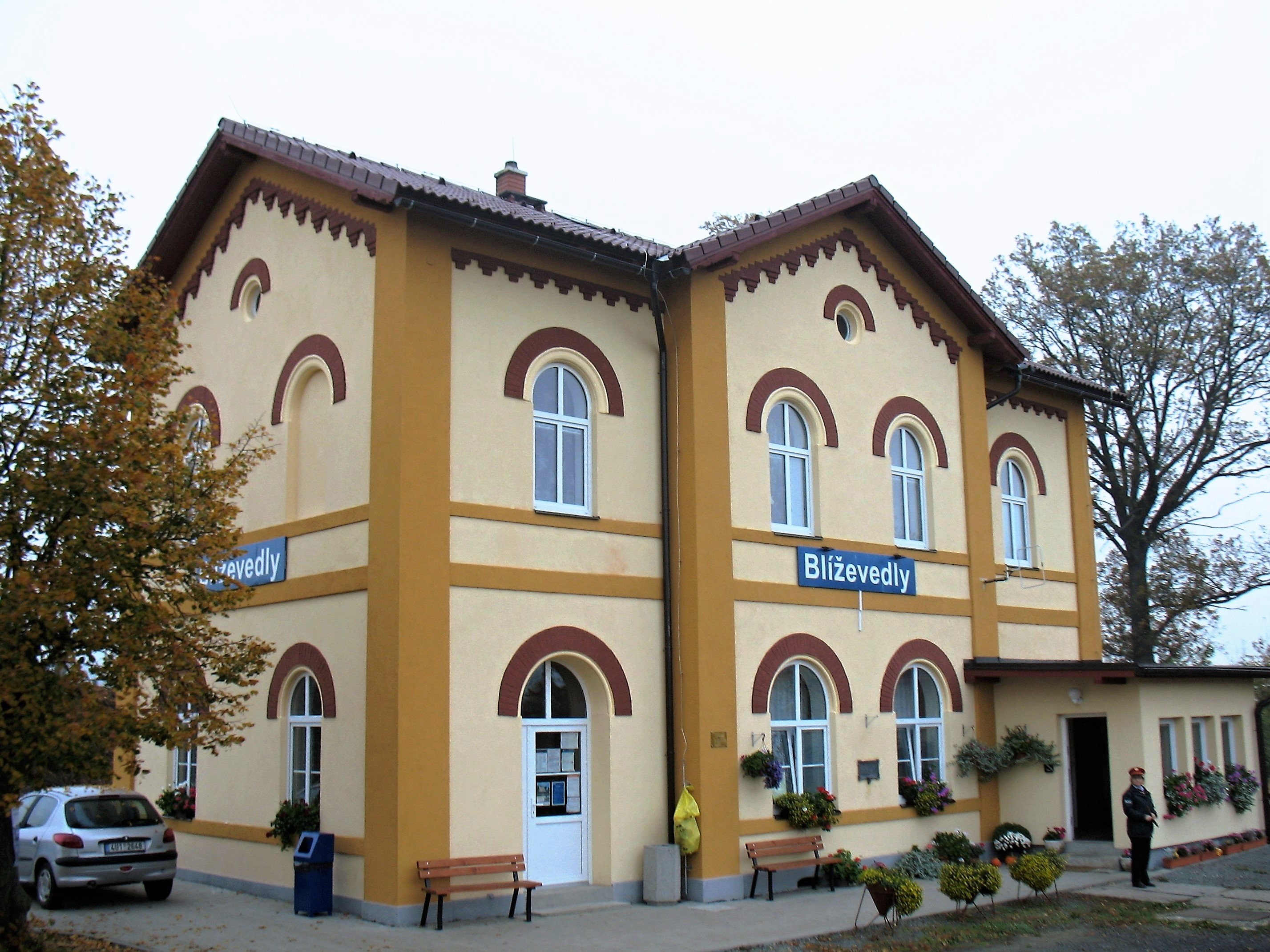 Železniční stanice Blíževedly, vítěz ankety Nejkrásnější nádraží ČR za rok 2019